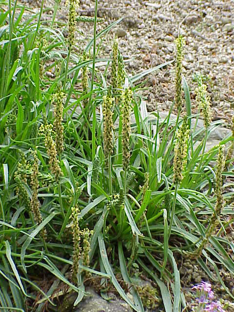 Species: Plantago alpina Family: Plantaginaceae Image No. 2